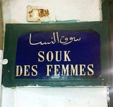 plaque métallique a l'entrée de Souk Des Femmes